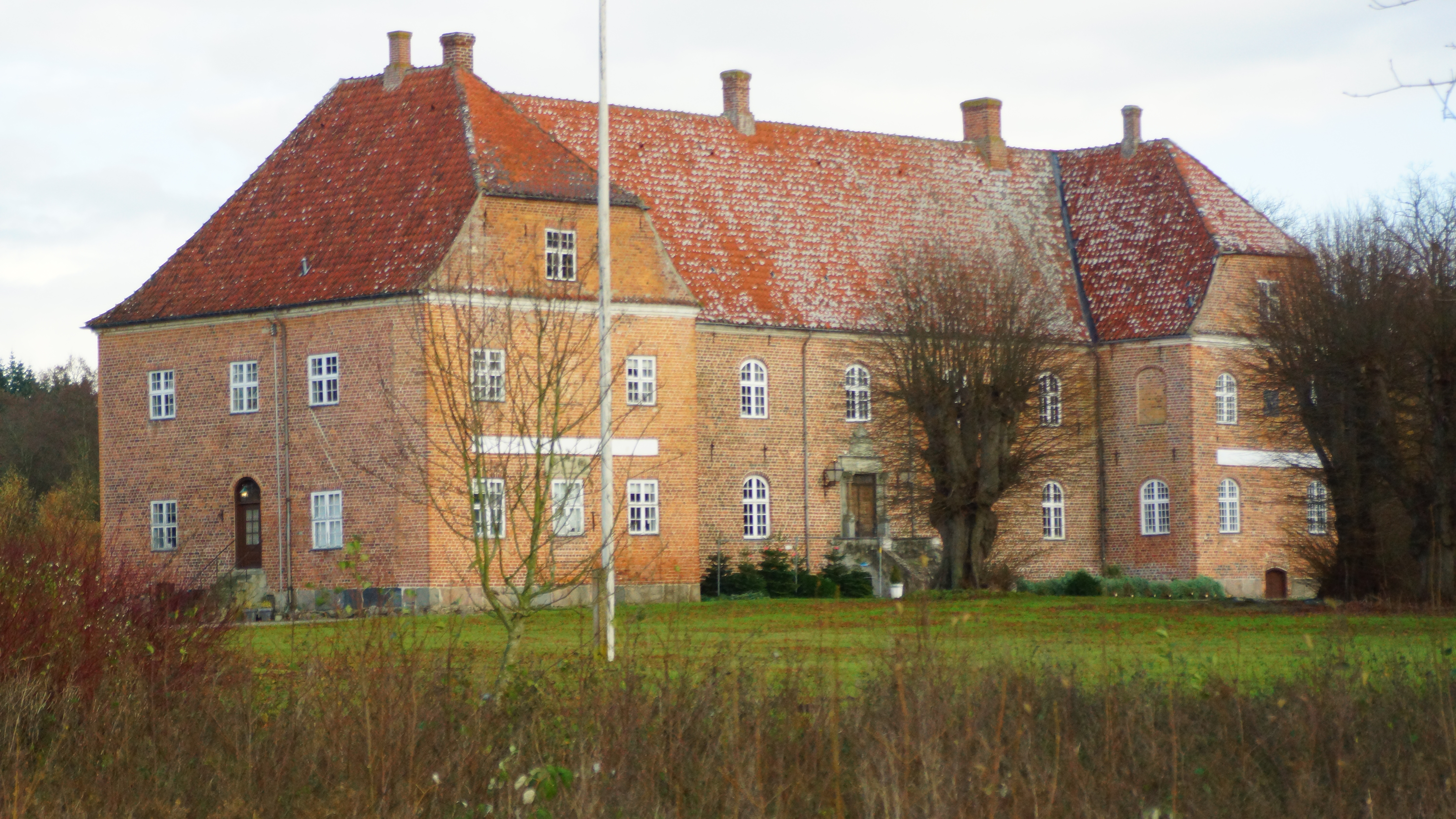 Gammel Ryomgård